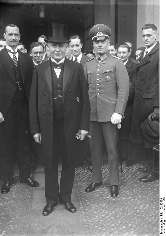 Reichsgründungsfeier der Studentenschaft am 18. Januar in der Universität zu Berlin ! Der Reichswehr- und Innenminister Dr. Groener nach der Reichsgründungsfeier vor der Universität in Berlin.